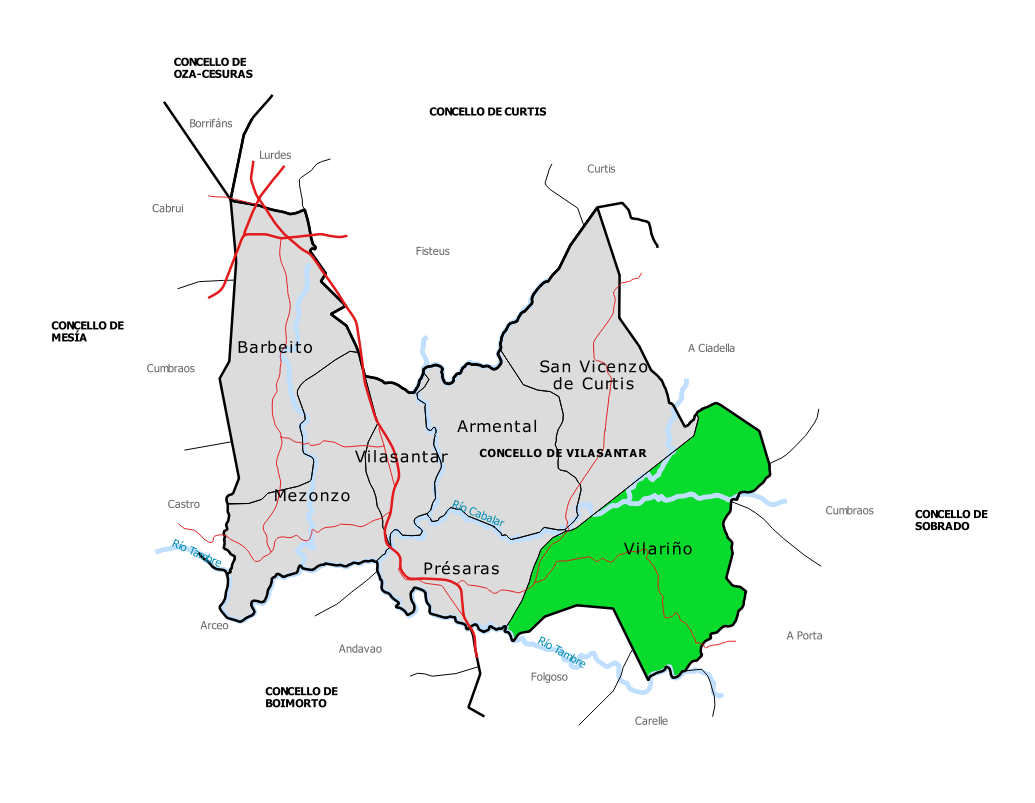 Mapa da parroquia de Vilariño no concello de Vilasantar.